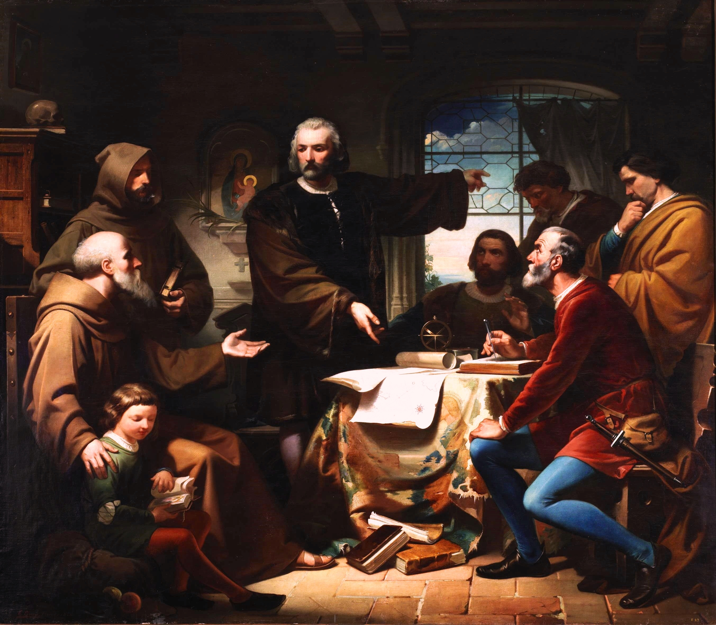 Esta obra representa el momento en el que Cristóbal Colón intentó persuadir a los monjes del monasterio de La Rábida para que aprobaran su proyectado viaje a las Indias, según consta en el Catálogo de la Exposición Nacional de 1856, donde este lienzo fue premiado con la primera medalla.